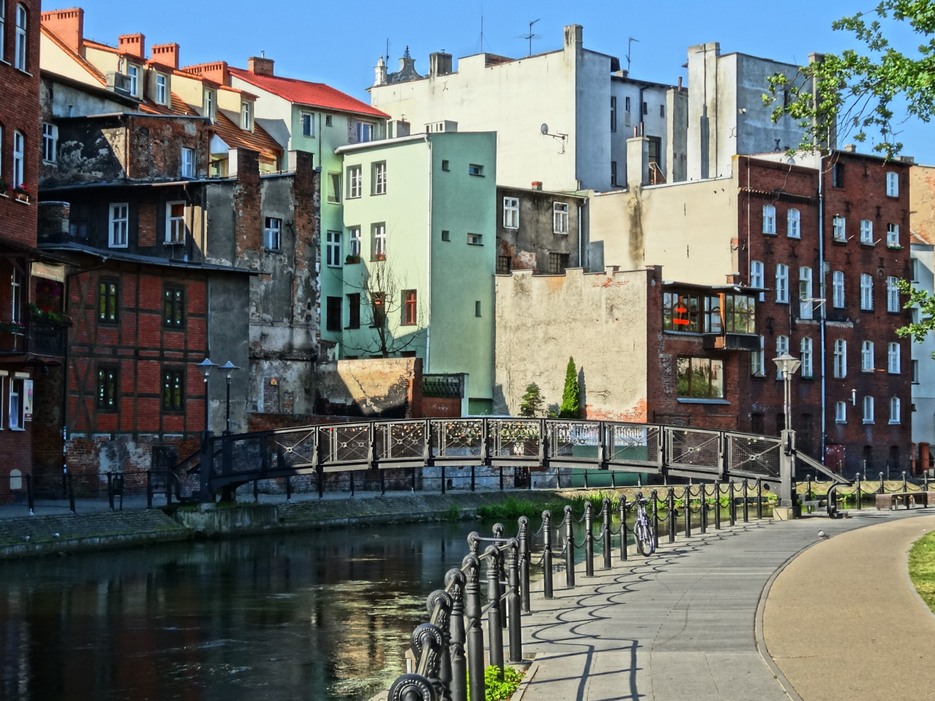 Wenecja Bydgoska – zespół architektoniczny Starego Miasta w Bydgoszczy zbudowany bezpośrednio nad rzeką Młynówką (1870-1900).